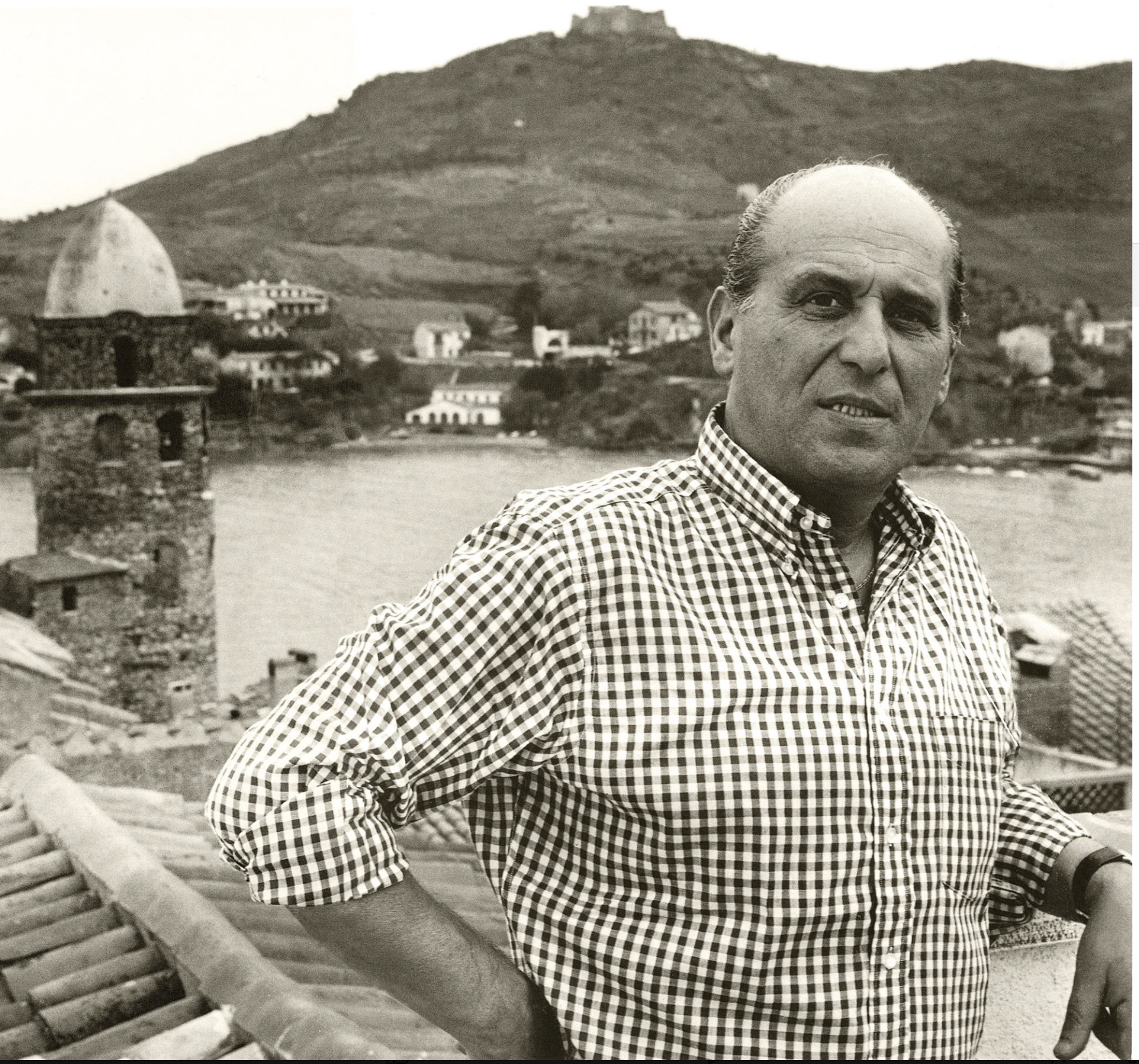 Willy Mucha portrait sur la terrasse .